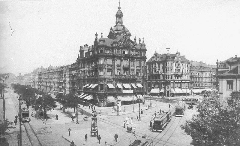 Dresden, Kaiserpalast (auch "Ilgenhaus", errichtet 1895 bis 1897), Pirnaischer Platz. Ein neobarocker Prachtbau der Gründerzeit. Foto um 1910.